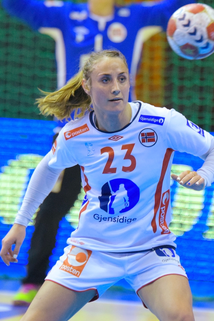 Camilla Herrem, ailière gauche de l'équipe de Norvège de handball féminin. Le 19 mars 2015 lors du match de golden League, Norvège / Pologne.